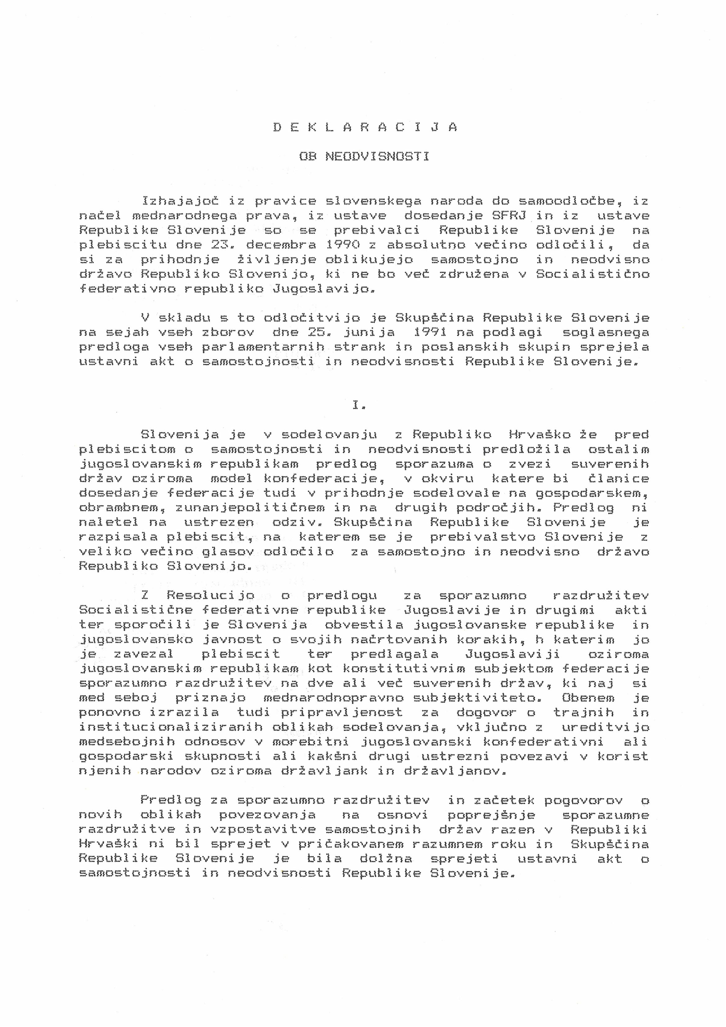 Deklaracija ob neodvisnosti.